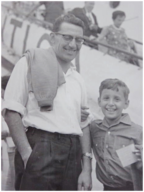 משה מנו עם אביו מרדכי